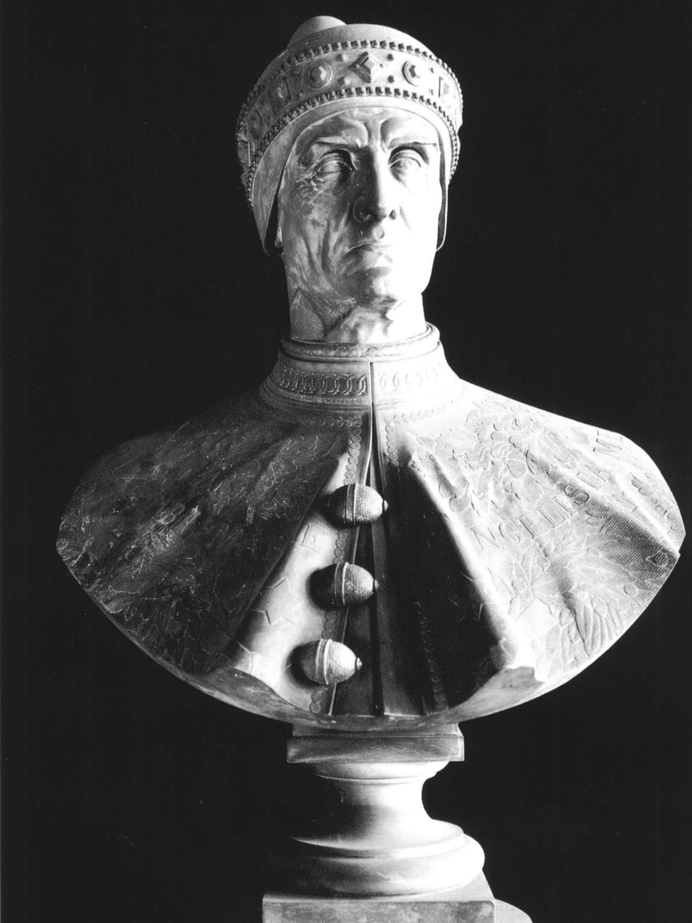 Busto di Leonardo Loredan, opera di Luigi Borro (1860-1861). Il busto fa parte del Panteon Veneto, conservato presso Palazzo Loredan di Campo Santo Stefano a Venezia.